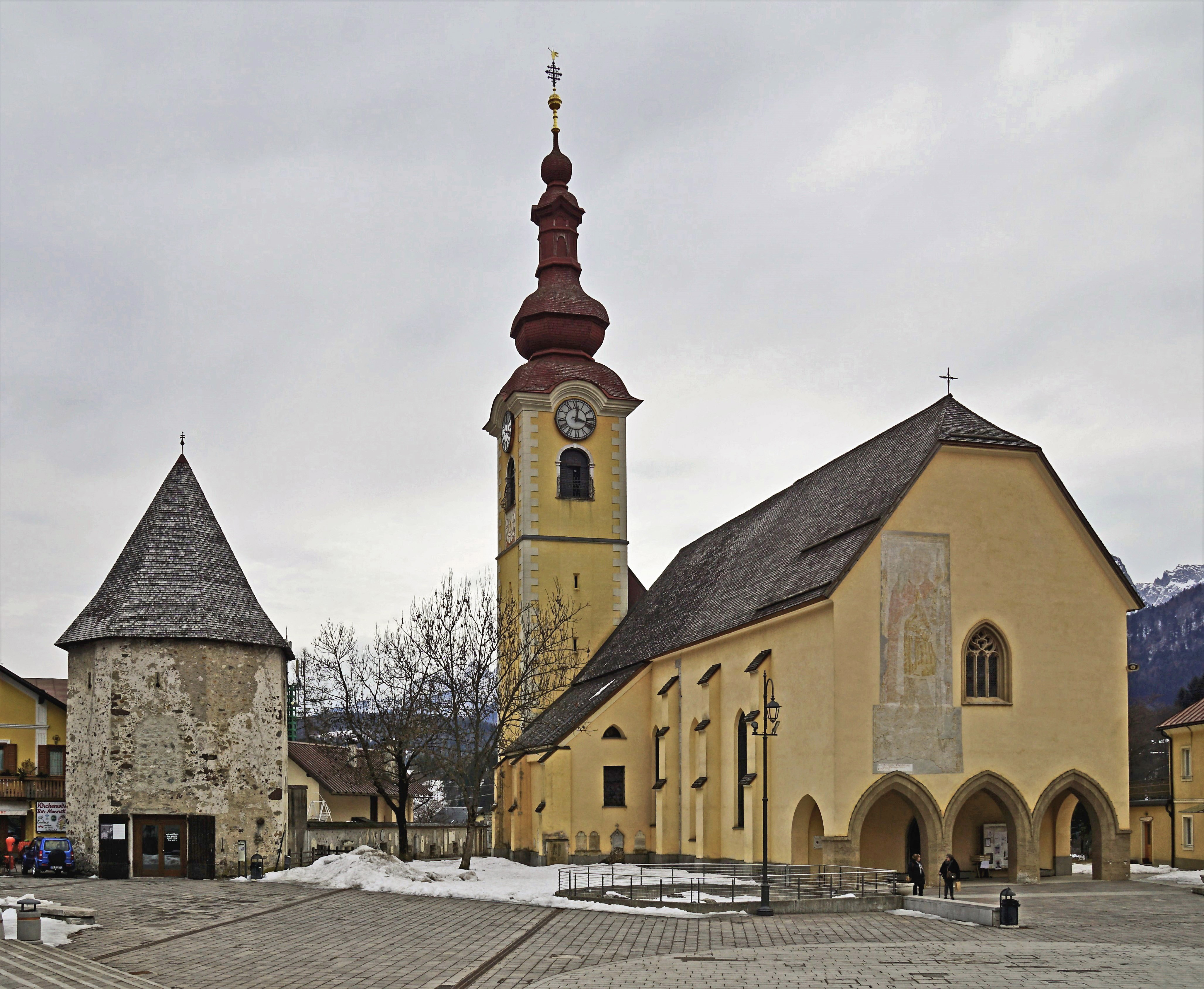 Pfarrkirche Sankt Peter und Paul (Tarvis) und Wehrturm